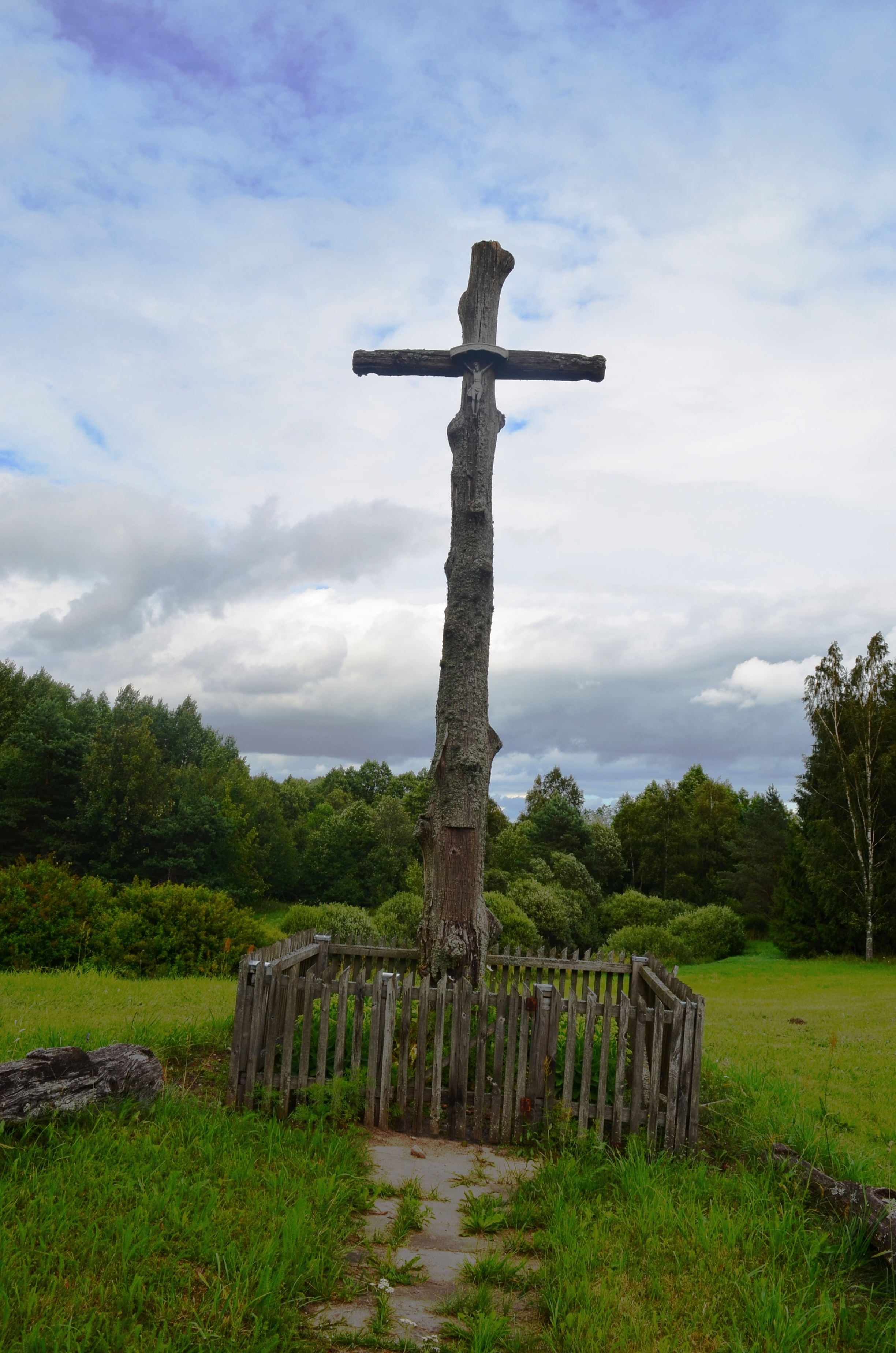 Apvaršuvos kryžius, Šilalės raj. Žemaitėška: Apvaršovas krīžios, Šėlalės raj.